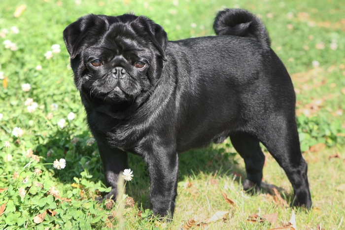 Mops Falk vom Mägdebrunnen ist Internationaler Champion der FCI aus der Mopszucht vom Mägdebrunnen aus Deutschland.